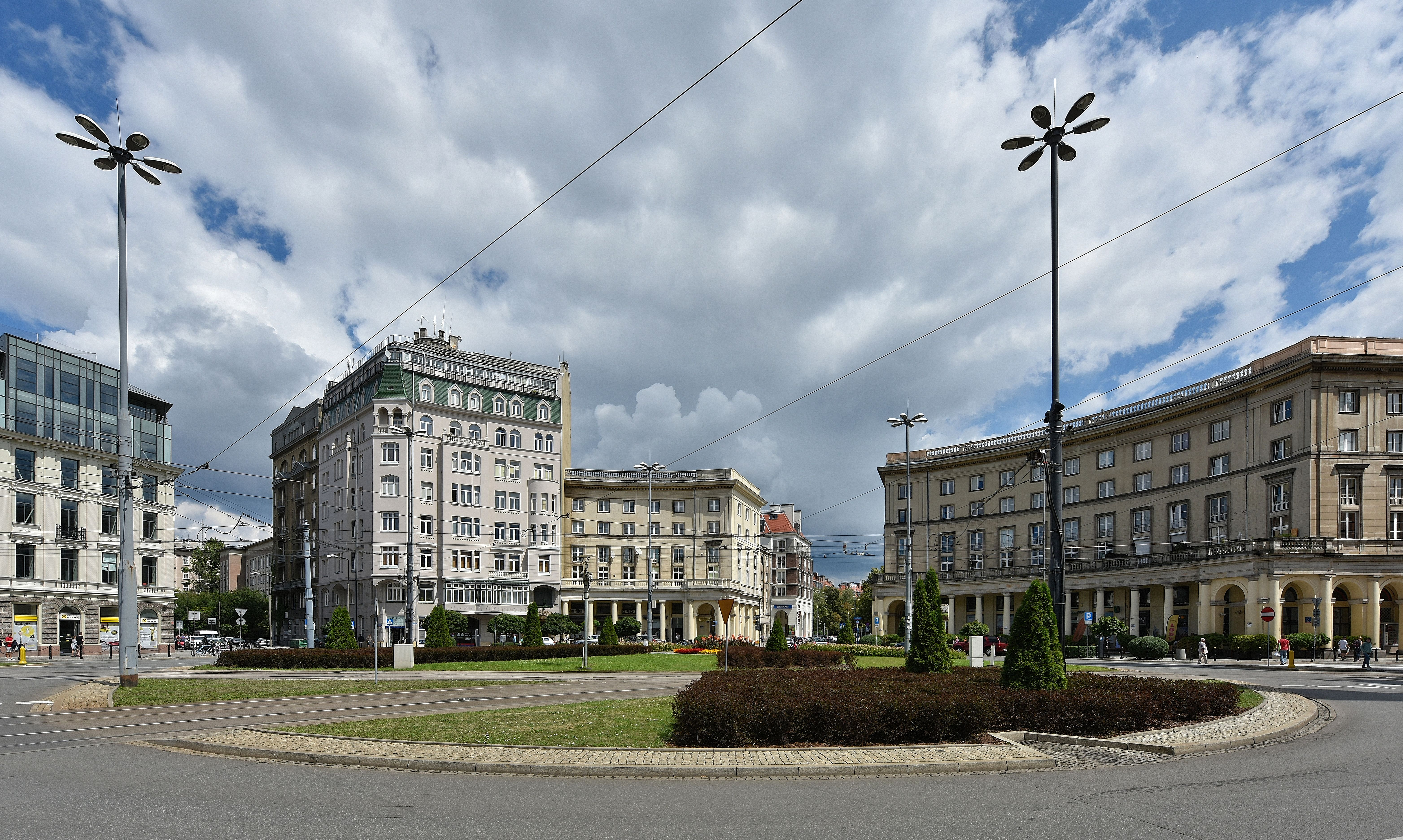 Plac Zbawiciela w Warszawie